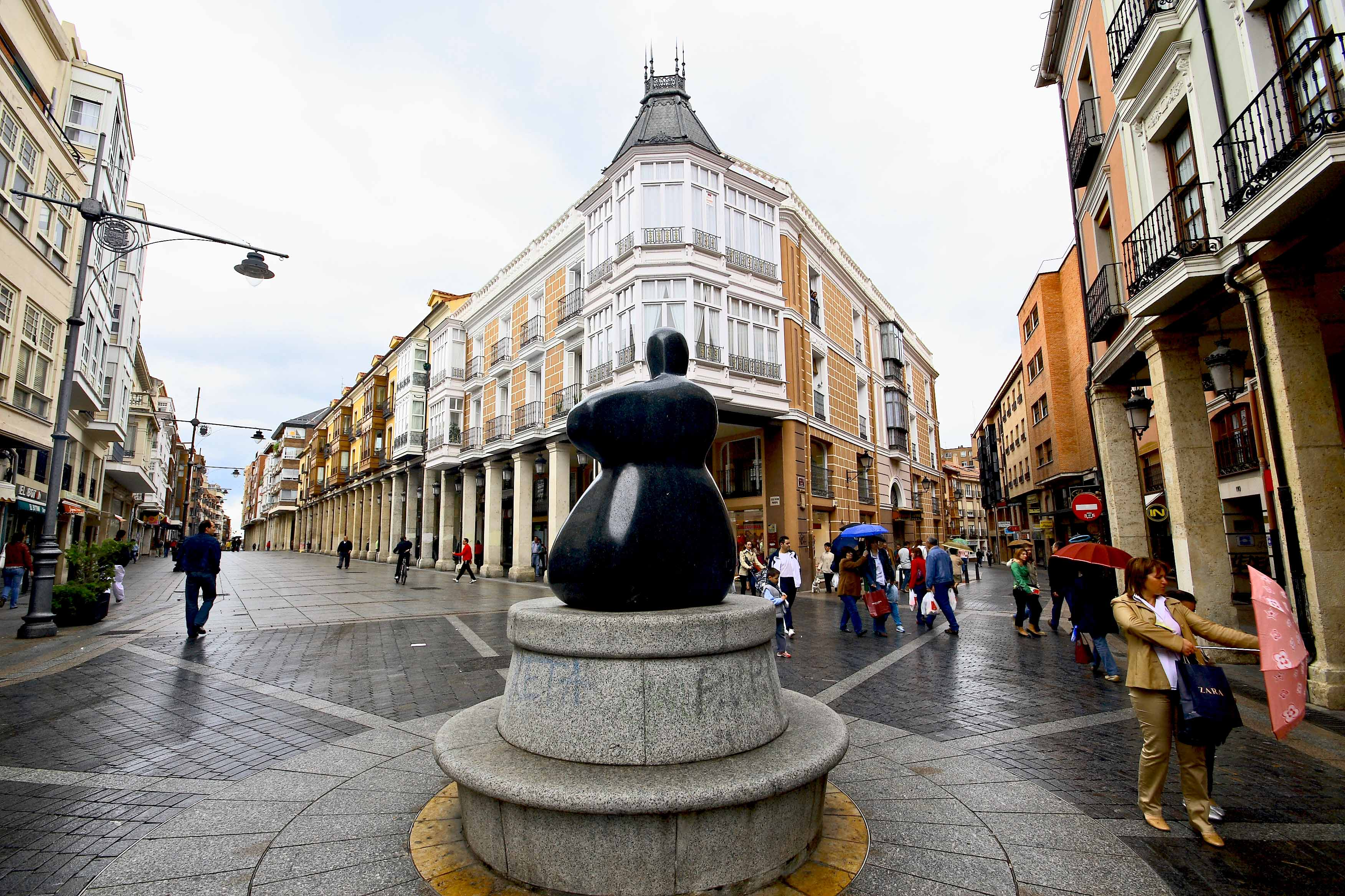 Canon 30D, Sigma 10-20 Calle Mayor de Palencia (España)